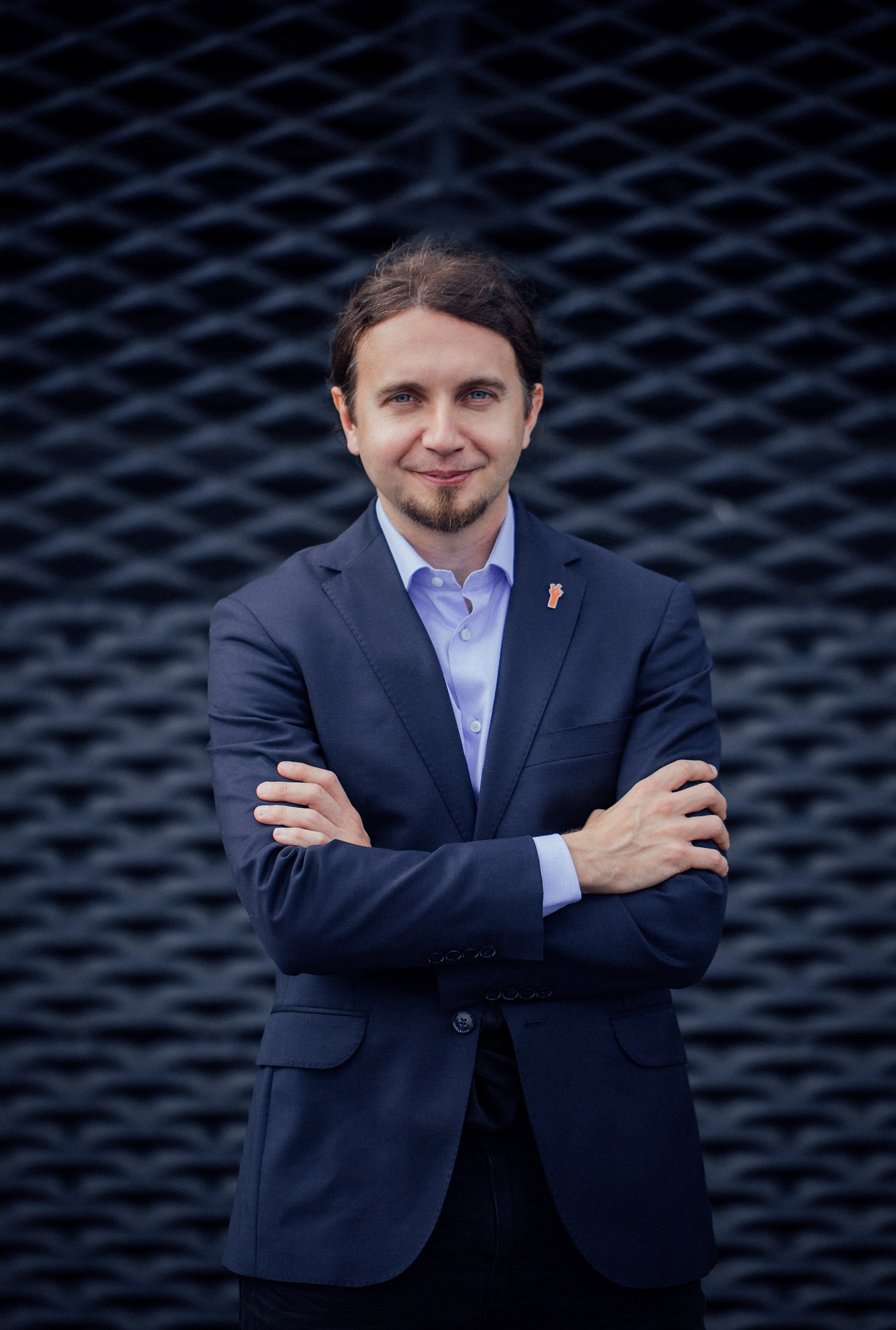 Łukasz Kohut, politolog, fotograf, działacz społeczny, przedsiębiorca i polityk; na tle elewacji Międzynarodowego Centrum Kongresowego w Katowicach